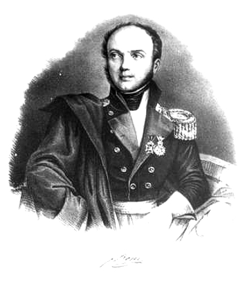 Polish and Hungarian general Józef Zachariasz Bem (1794-1850)